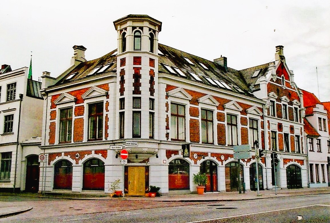 Das 1876 erbaute Petitsche Geschäftshaus.